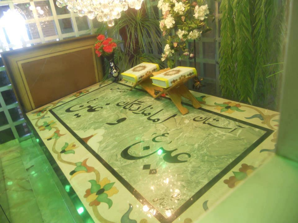 مقبره امامزاده عین (ع) و امامزاده غین (ع) در روستای وهن آباد